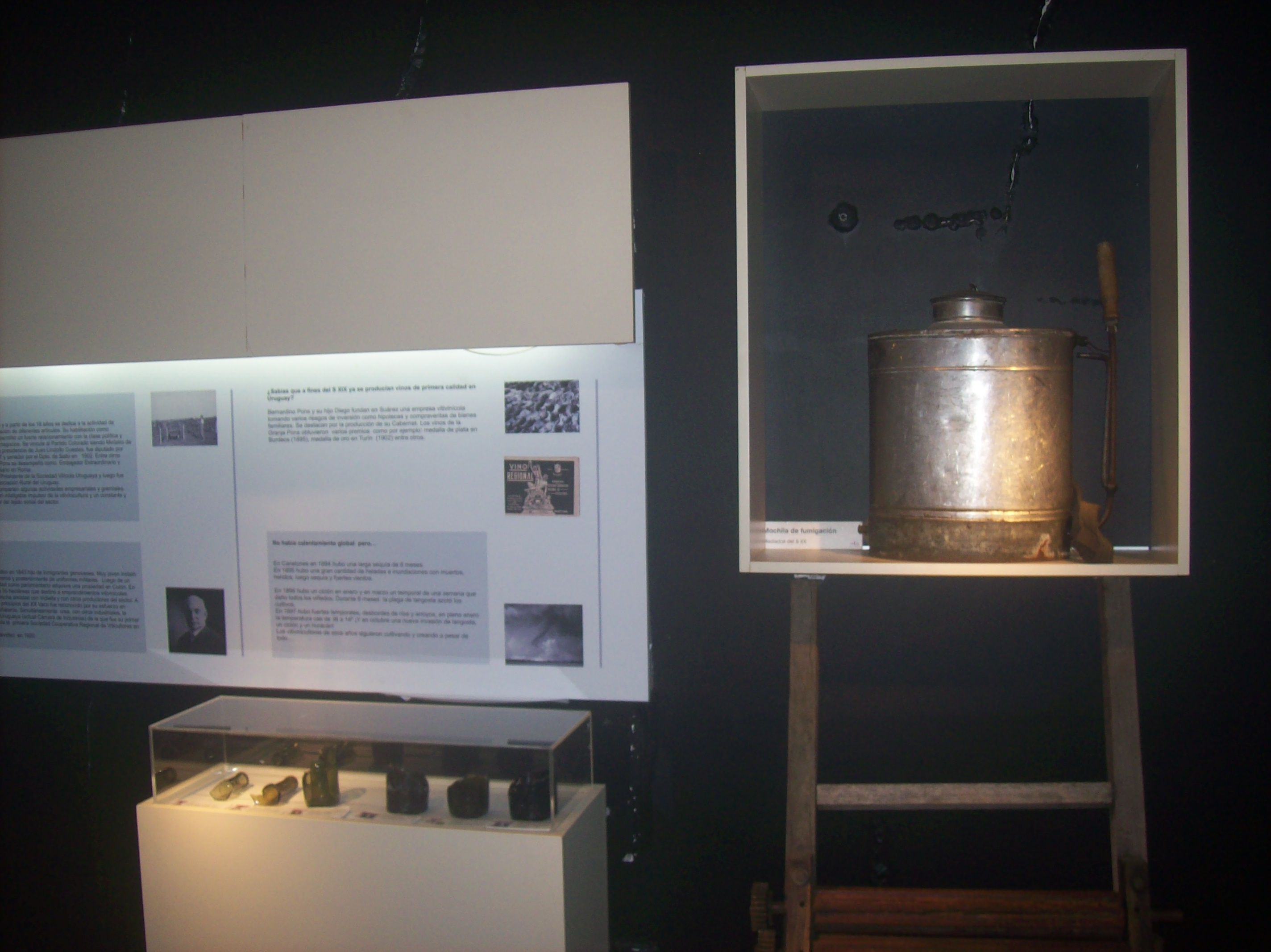 Exposición en el Museo de la Uva y el Vino